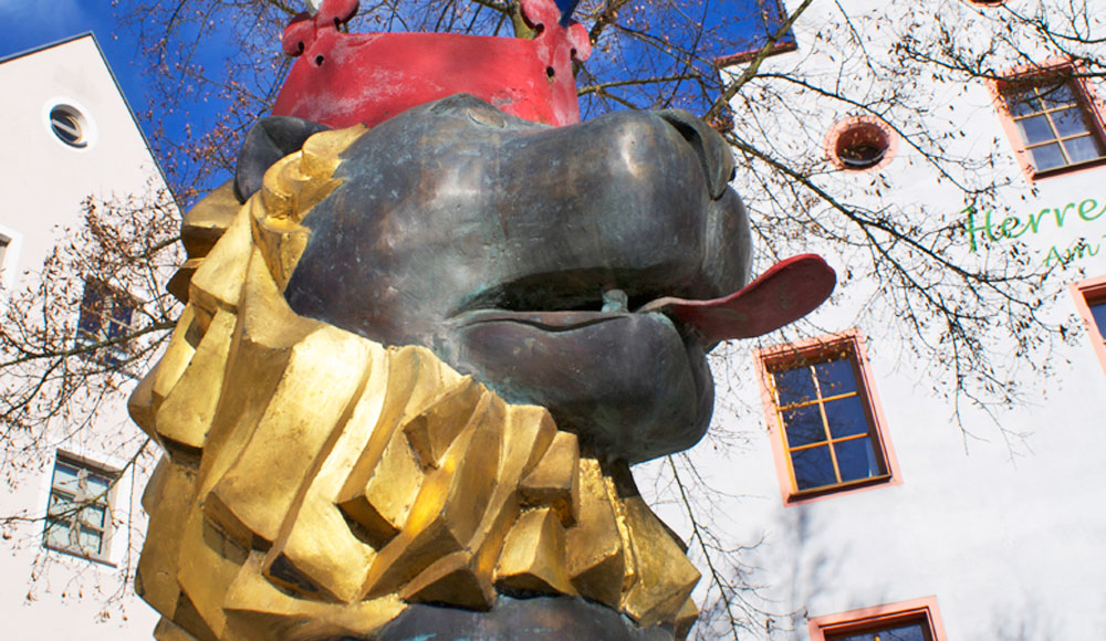 Das Wappentier von Laaber (Stadtbrunnen)